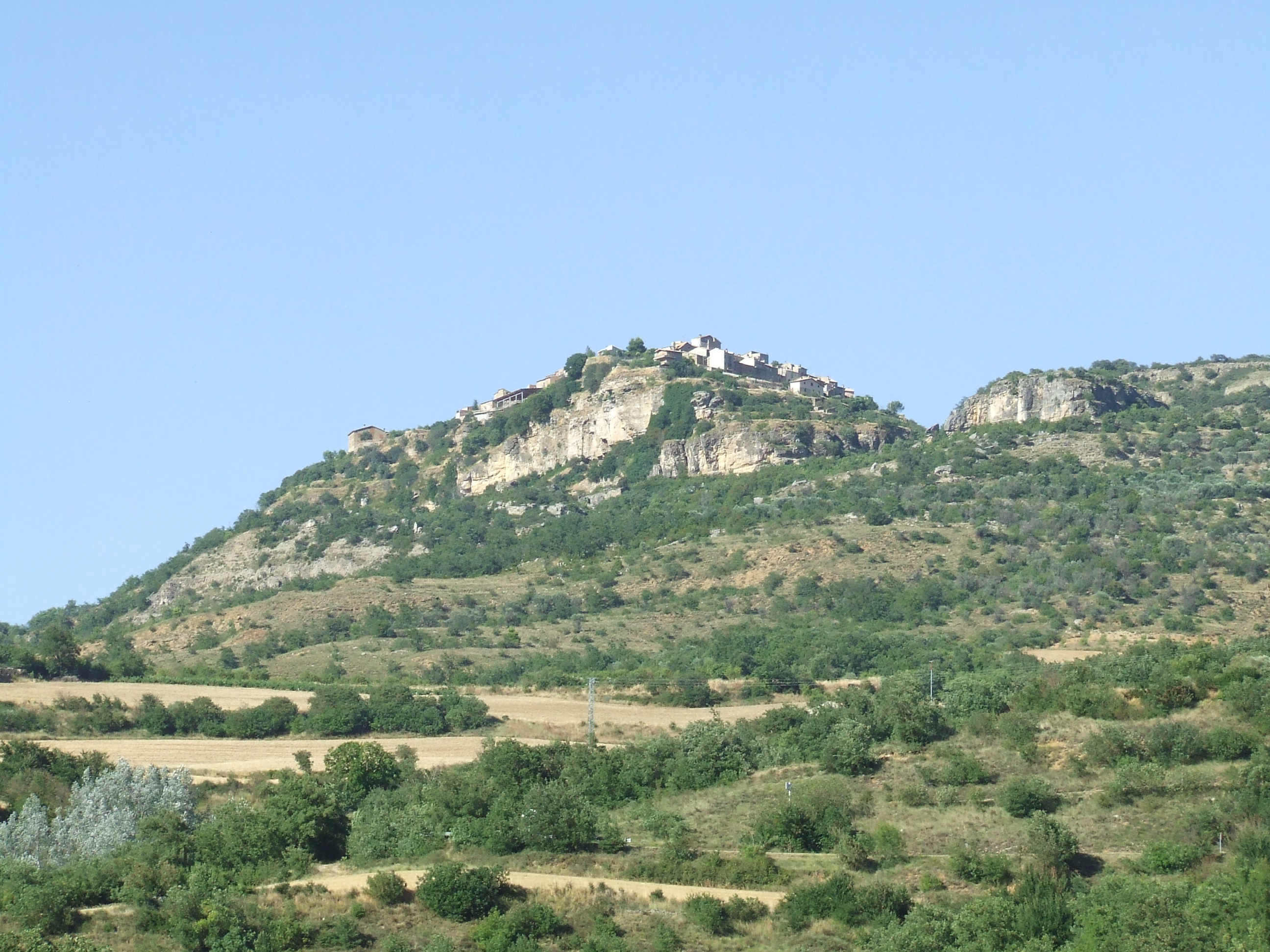 La vila de Llimiana, dalt del seu turó (Pallars Jussè)